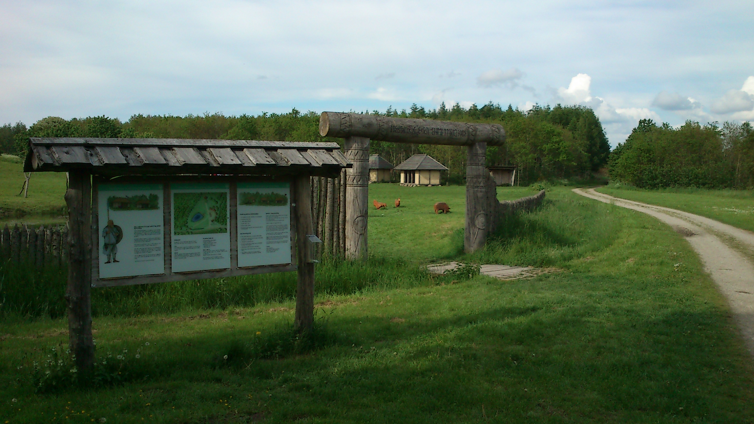 Aktivitetsplads Lisbjerg Skov